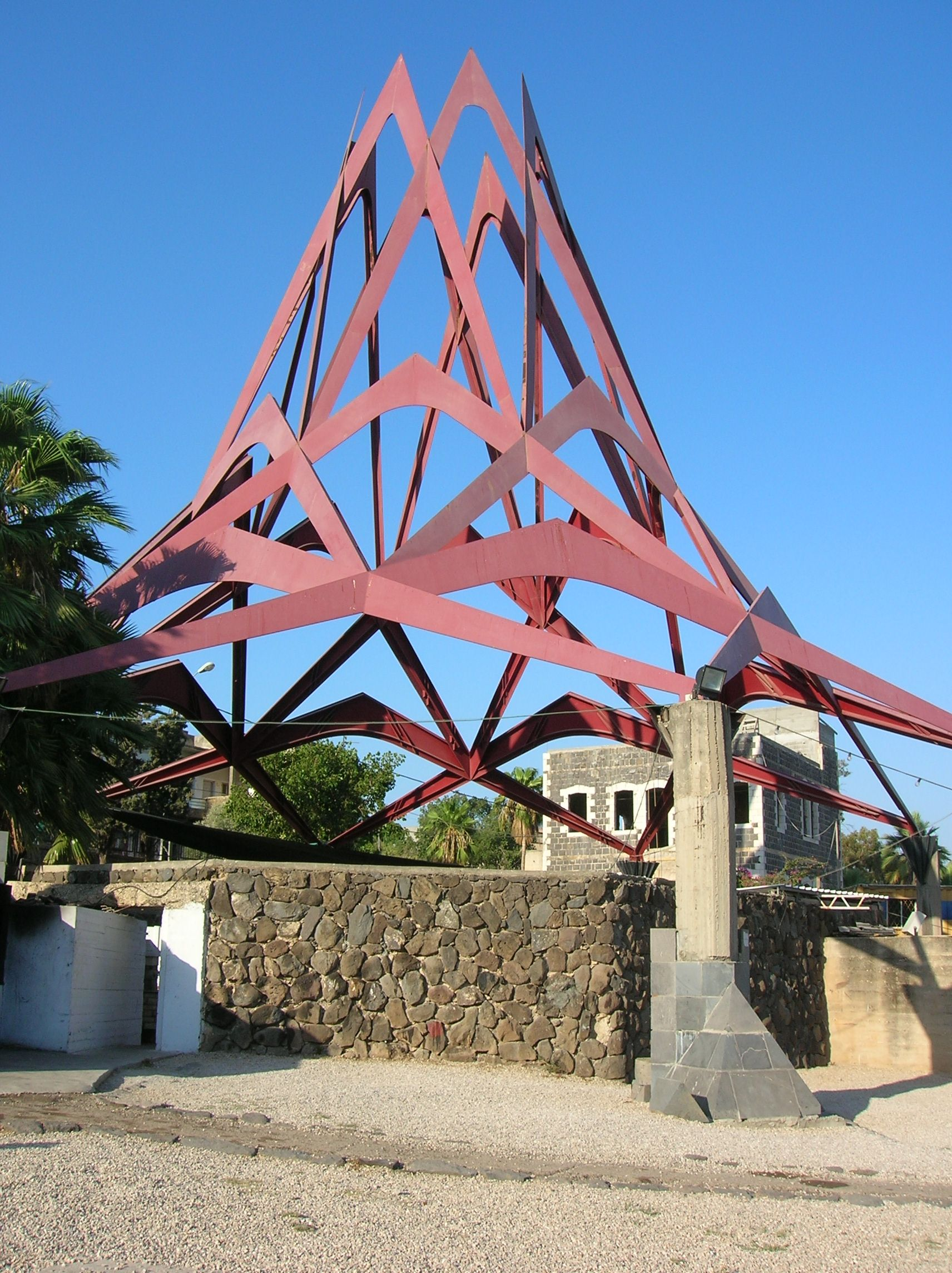 Israel - Tiberias - Maimonides memorial grave